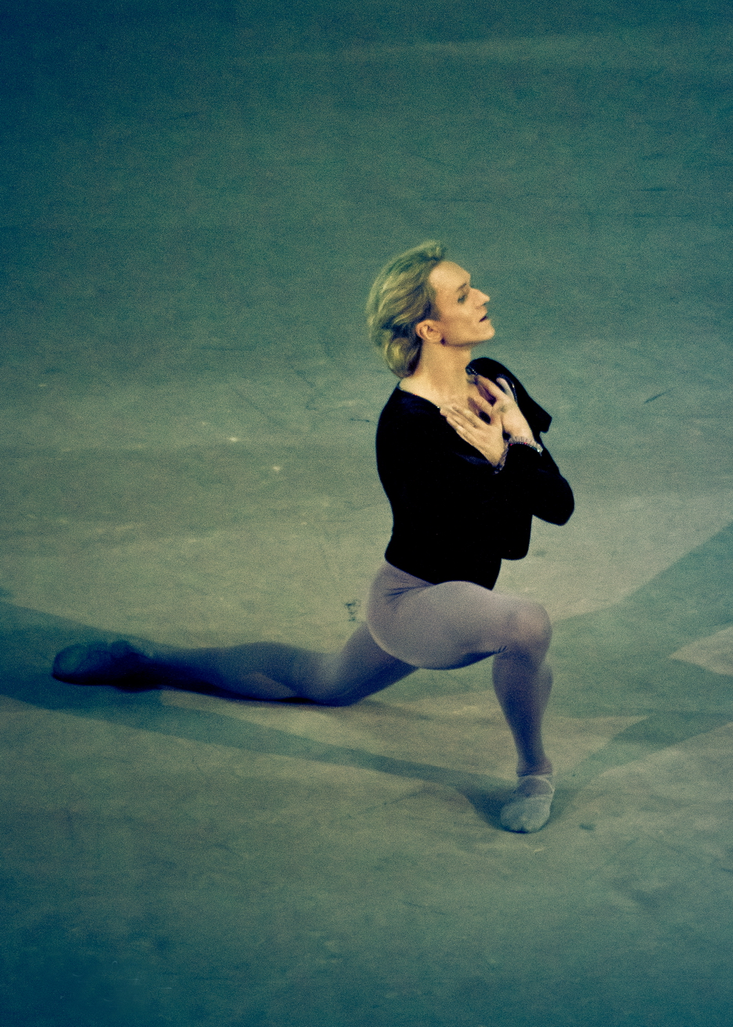 Дмитрий Гуданов в партии Альберта, балет "Жизель", Большой театр, Москва